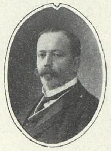 Antonín Zázvorka (1866-1937), rakouský a český statkář a politik